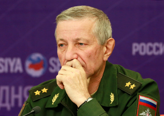 Начальник ансамбля — художественный руководитель Академического ансамбля песни и пляски Российской Армии имени А.В.Александрова, народный артист Российской Федерации генерал-лейтенант Халилов Валерий Михайлович на презентации премии Минобороны России в сфере культуры и искусства